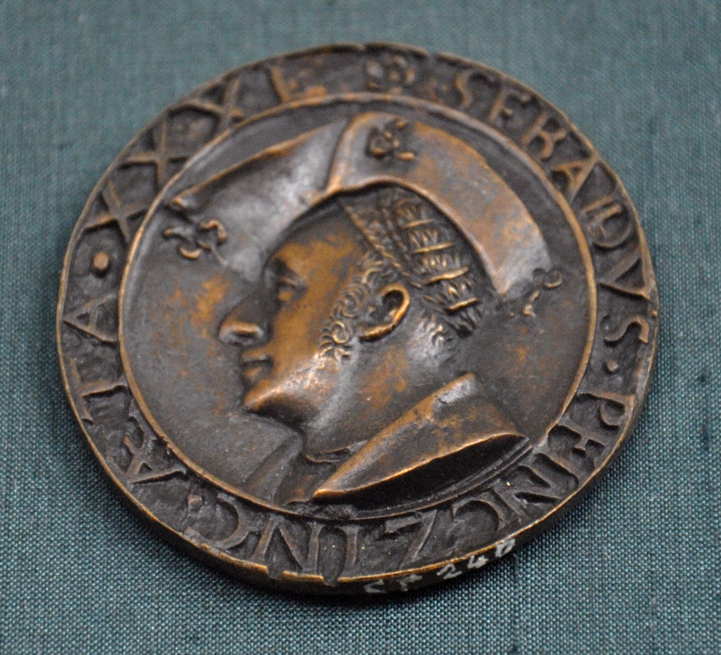 Bronzemedaille Sebald Pfinzing Tucher (1487-1537), Ratsherr in Nürnberg Vorderseite: Portrait, SEBALDVS. PFINCZING. AETA. XXXI. Rückseite: Familienwappen, unten rechts kleines Wappen mit gekreuzten Stangen, M. D. XVIIII. Museum für Angewandte Kunst, Frankfurt am Main, Inv. Nr. St. 240